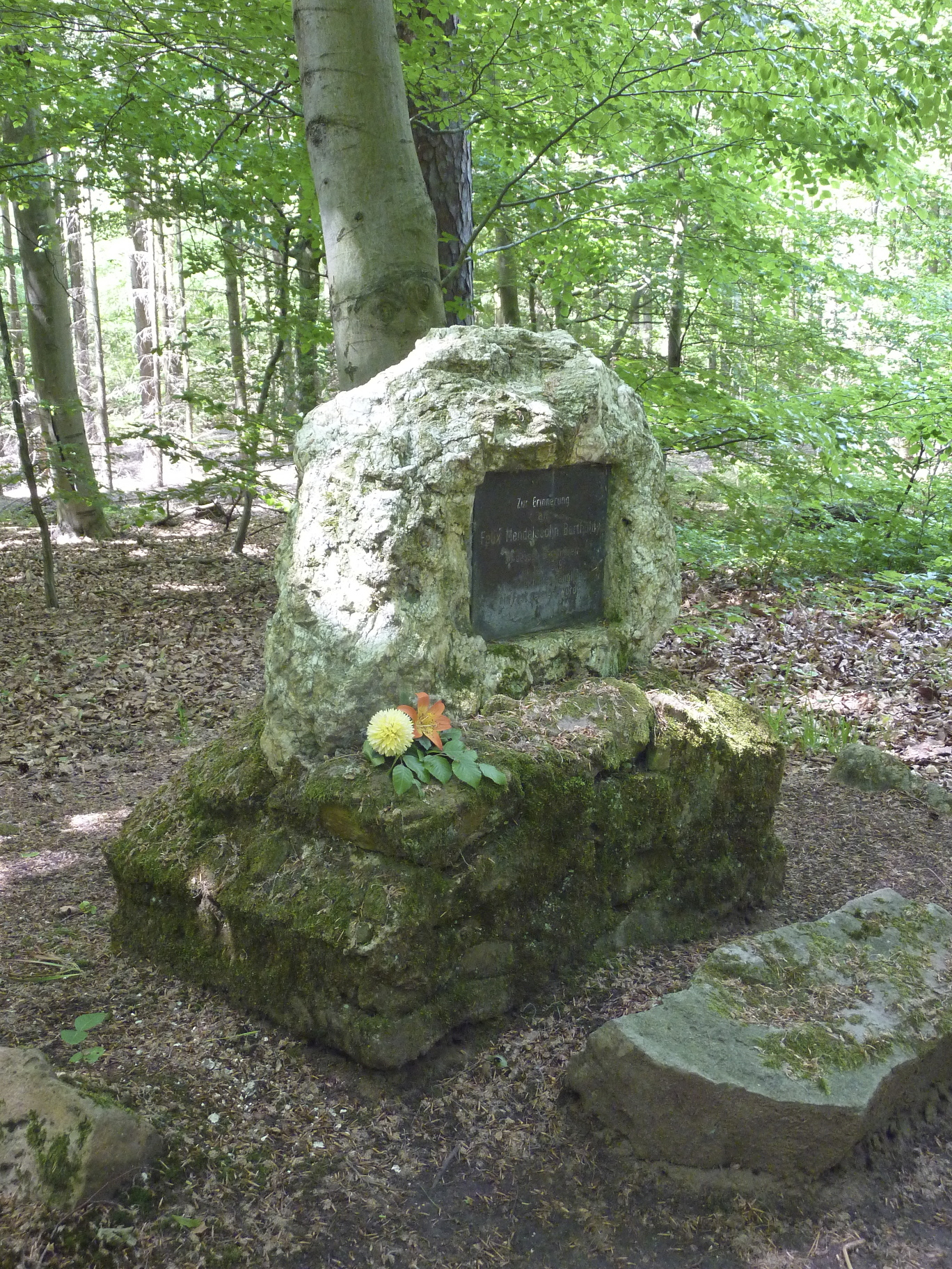 Die Mendelssohnruhe ist eine kleine Waldlichtung mit Gedenkstein auf dem Gebiet der Stadt Frankfurt am Main. Die Lichtung im Süden des Frankfurter Stadtwaldes liegt auf der Gemarkung des Stadtteils Frankfurt-Sachsenhausen. Der Ort ist dem Andenken an den Komponisten Felix Mendelssohn Bartholdy gewidmet. Die Inschrift der am Gedenkstein angebrachten Tafel lautet: „Zur Erinnerung an Felix Mendelssohn Bartholdy[,] zu dessen Ehren hier im Juli 1839 von Frankfurter Familien ein Fest gefeiert wurde.“